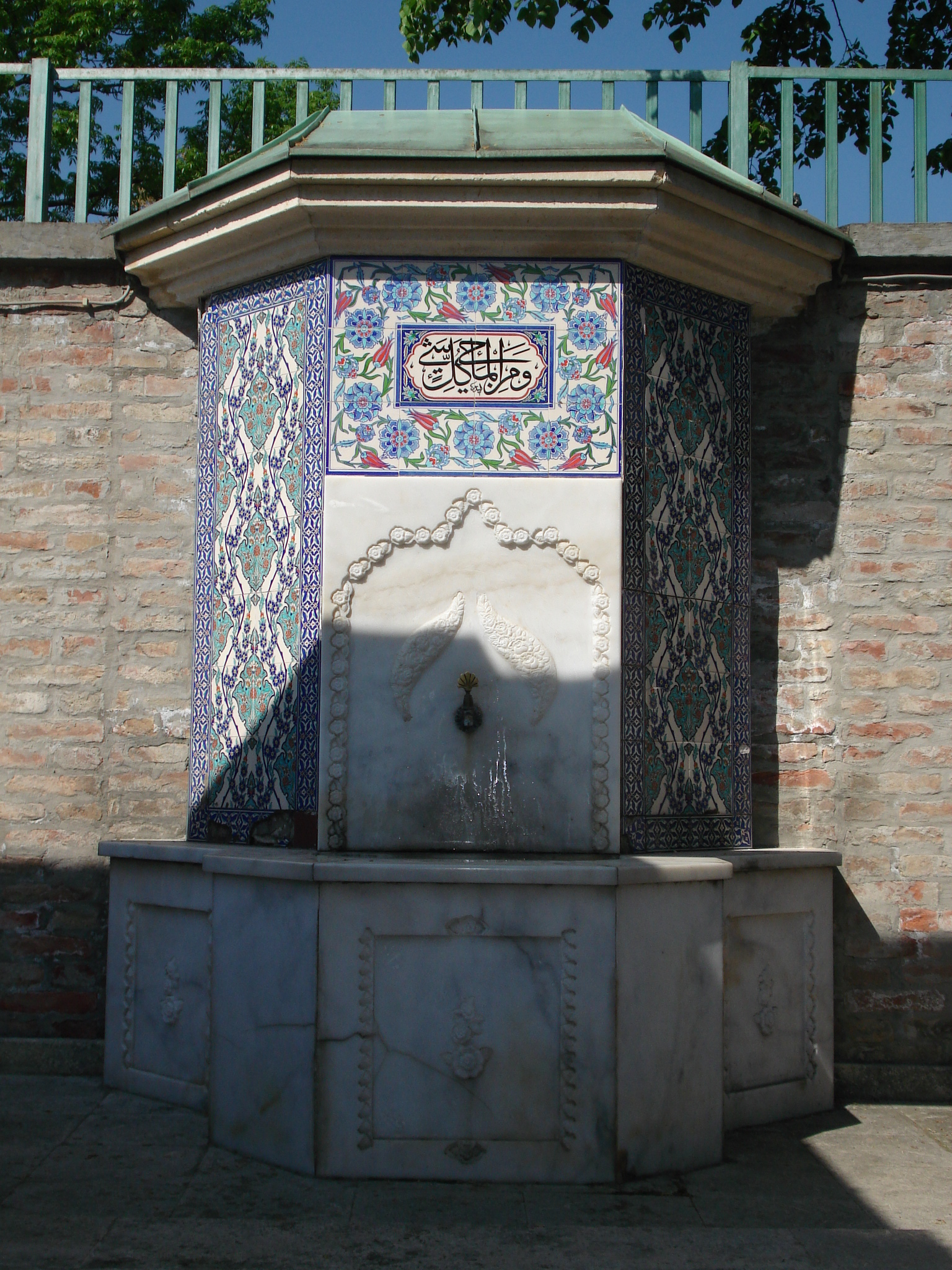 Gül Baba Türbesindeki Cesme